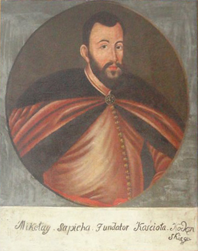 Беларуская (тарашкевіца): Партрэт Мікалая Сапегі «Пабожнага» (Mikałaj Sapieha «Pabožny») гербу «Ліс» (1581—1644), ваяводы берасьцейскага і менскага